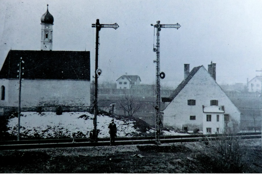 Kirche St. Johann (links) und Leprosenhaus (rechts) von Norden in Weilheim in Oberbayern – Töllern